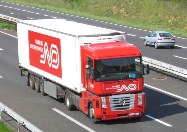 Camion Renault Magnum". - Licence GFDL. Auteur : Olivier MEYER Olivier Meyer